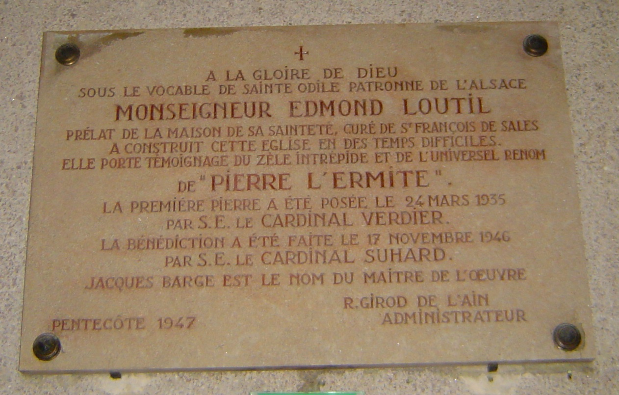 Photos prises à Paris